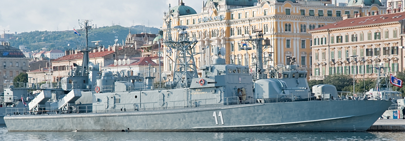 Dan HRM-a, Rijeka